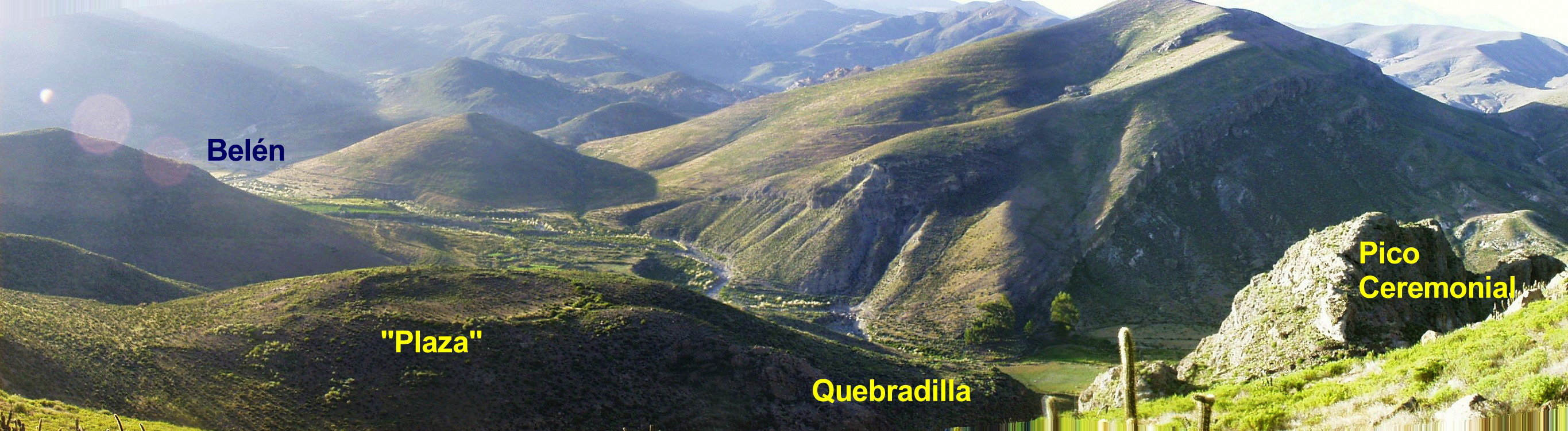 Pucará de Belén o Huaihuarani e Incahullo This is a photo of a national monument in Chile: 260